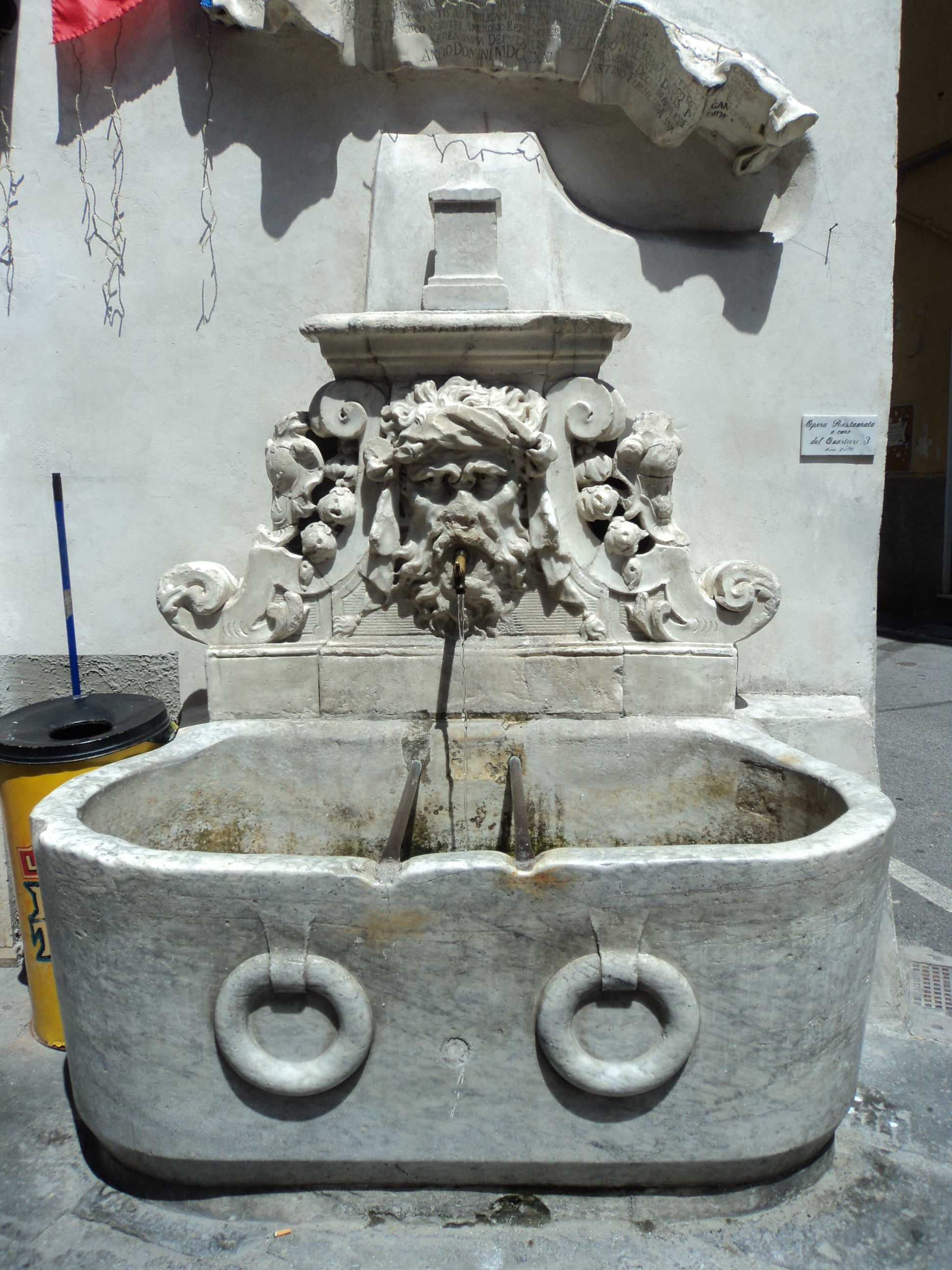 L'immagine rappresenta la fontana della piazzetta di Borgo del Ponte, a Massa